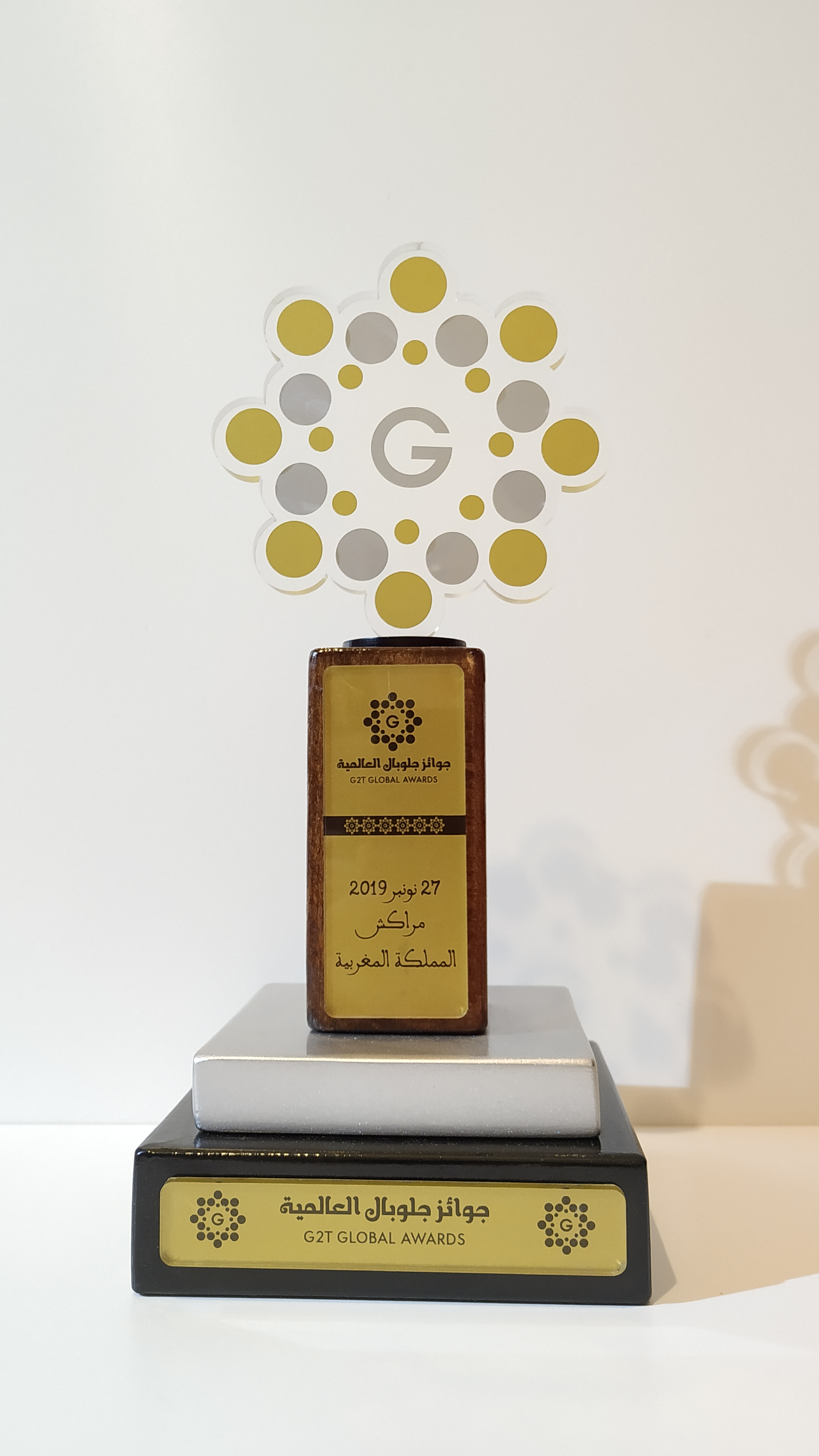 مجسم ثلاثي الابعاد لجوائز جلوبال العالمية